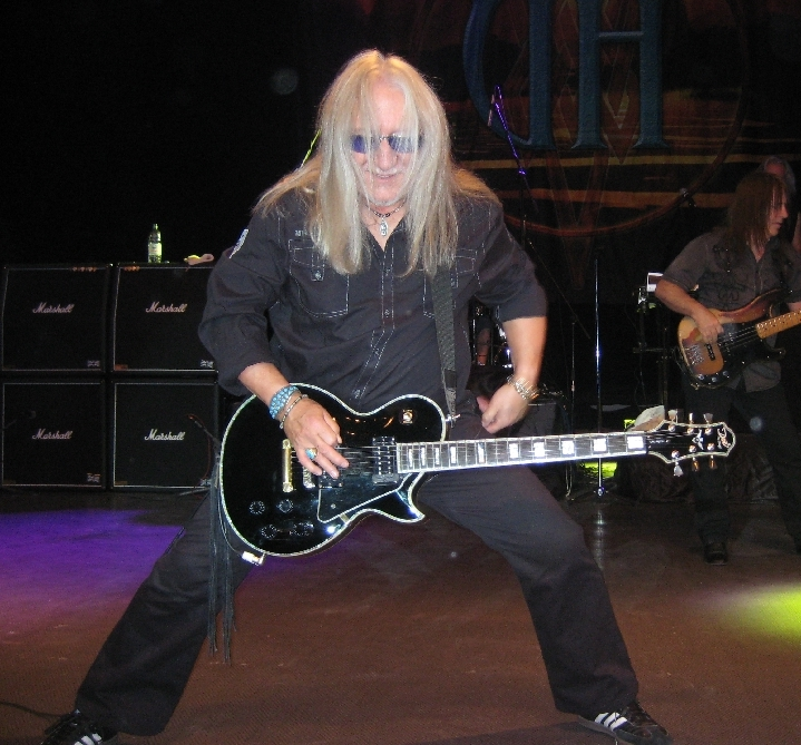 Мик Бокс (Юрайа Хип) в Алматы